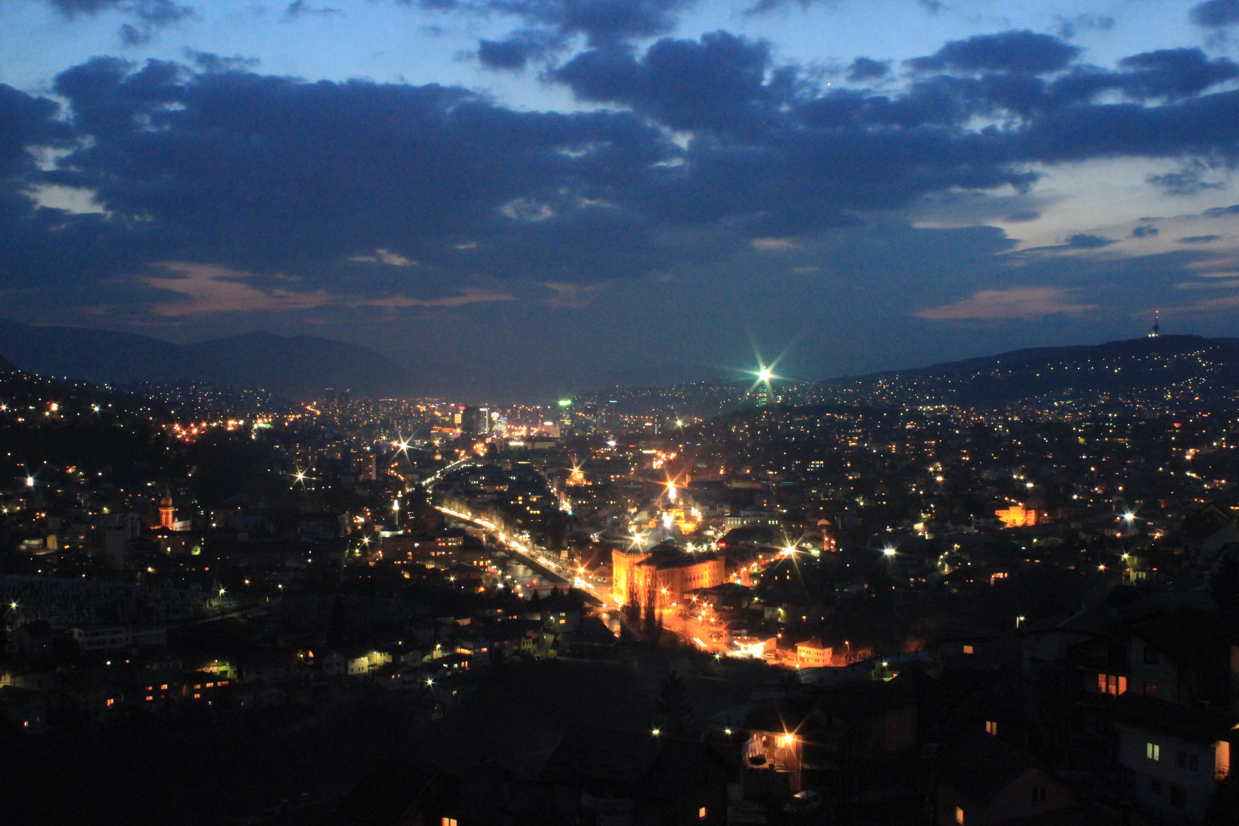 Hornjoserbsce: Napohlad Sarajewa z twjerdźizny Bijela Tabija.